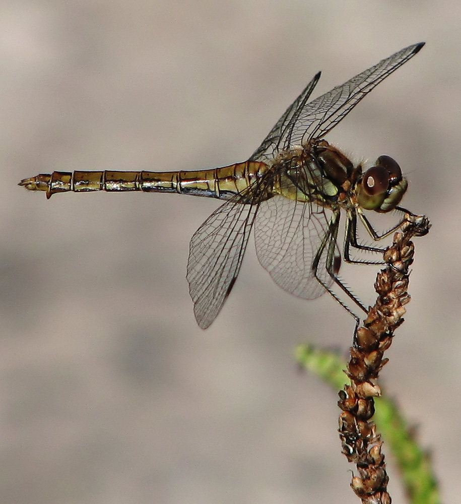 Beschreibung: Gemeine Heidelibelle (Sympetrum vulgatum) Fotograf: Darkone, 18. August 2005